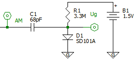 Gitterkombination mit Halbleiterdiode und Vorspannung